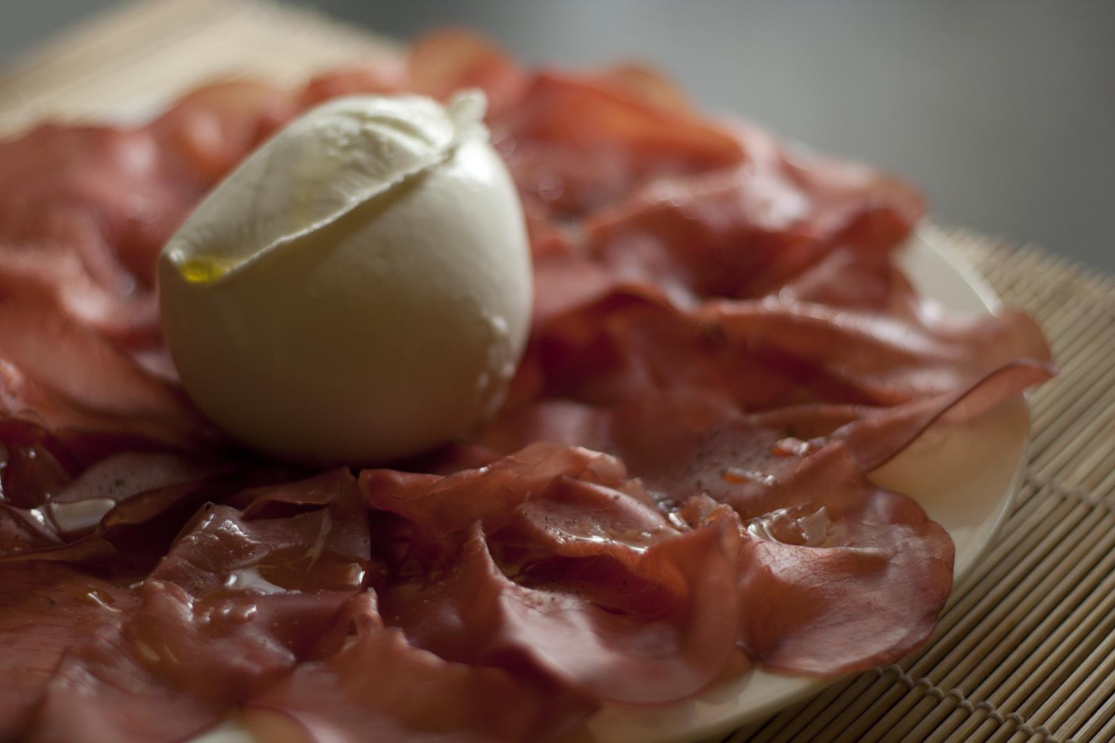 Bresaola & Mozzarella